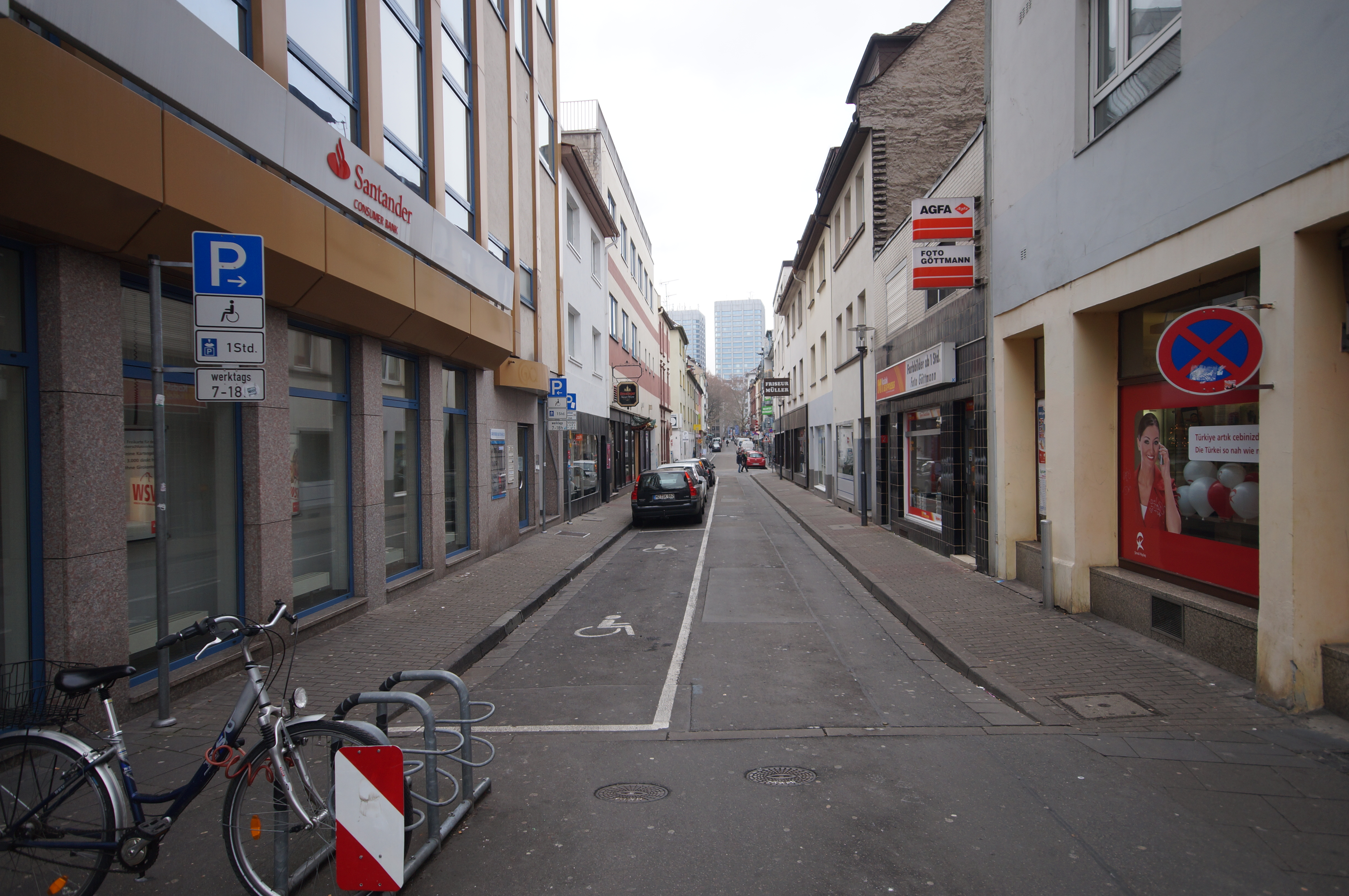 Die Zanggasse in Mainz-Altstadt von der Großen Bleiche zur Kaiserstraße blickend. Im Hintergrund sind die Bonifazius-Türme zu sehen.